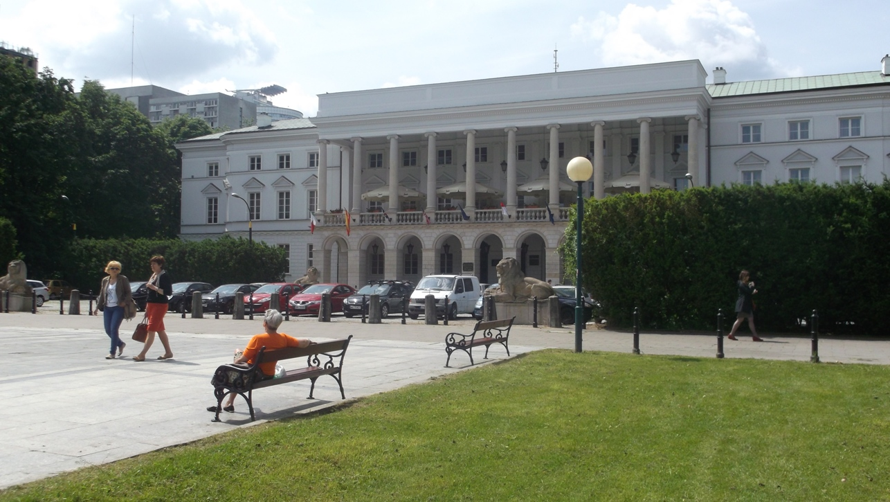 Warszawa, Pałac Lubomirskich, XVIII, po 1945